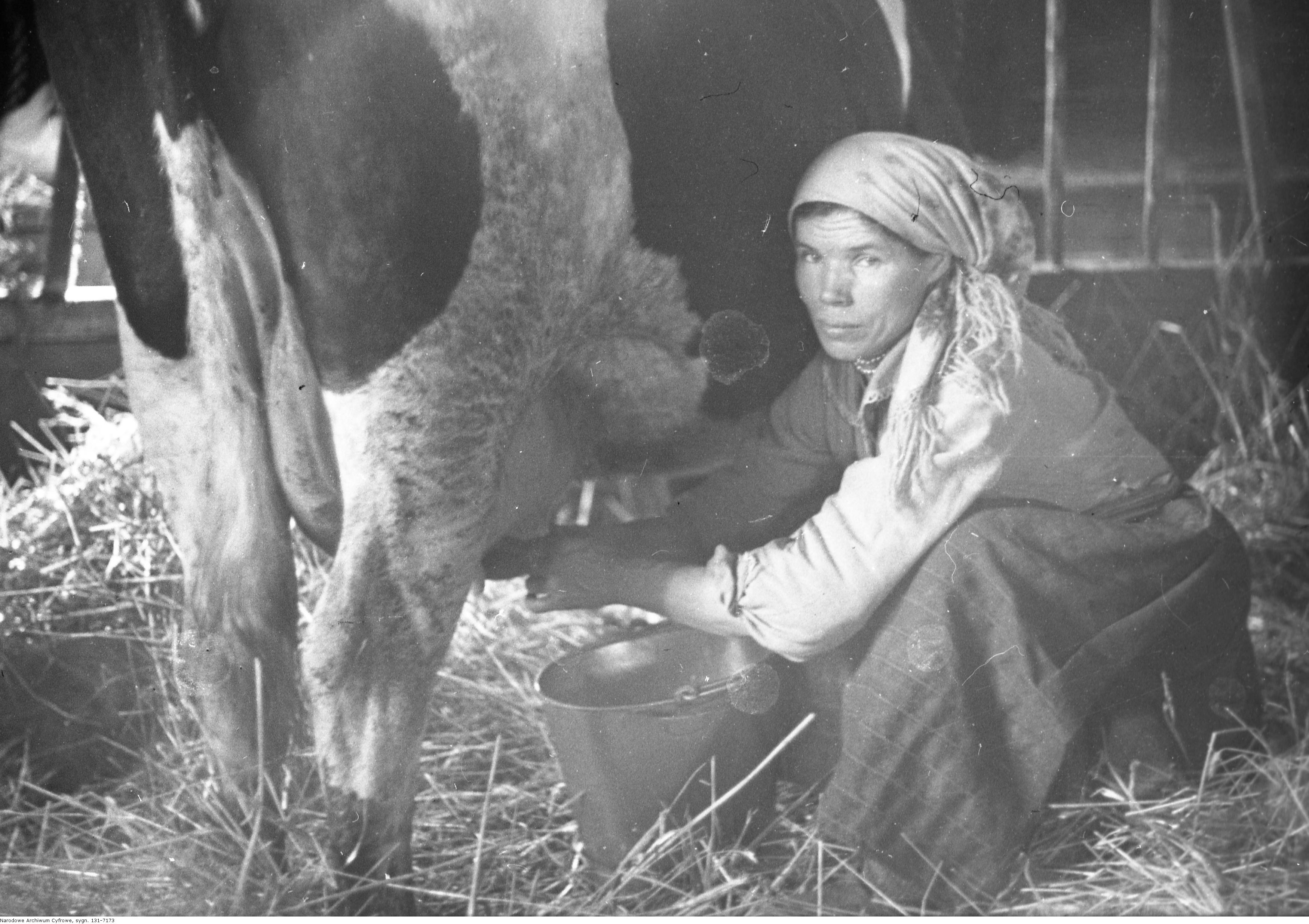 [Kobieta podczas dojenia krowy w oborze.]